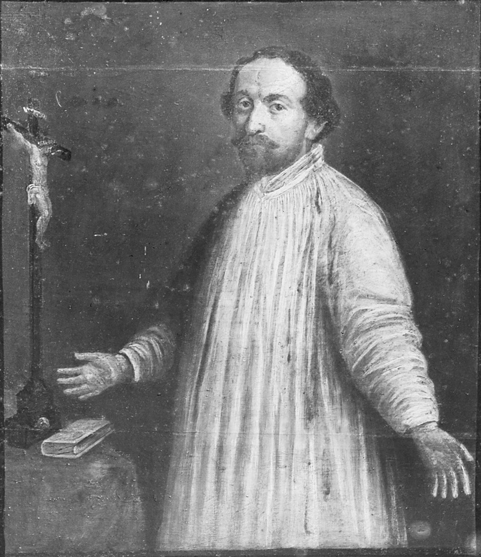 Rietmolen: Rooms-Katholieke Pastorie, schilderijen